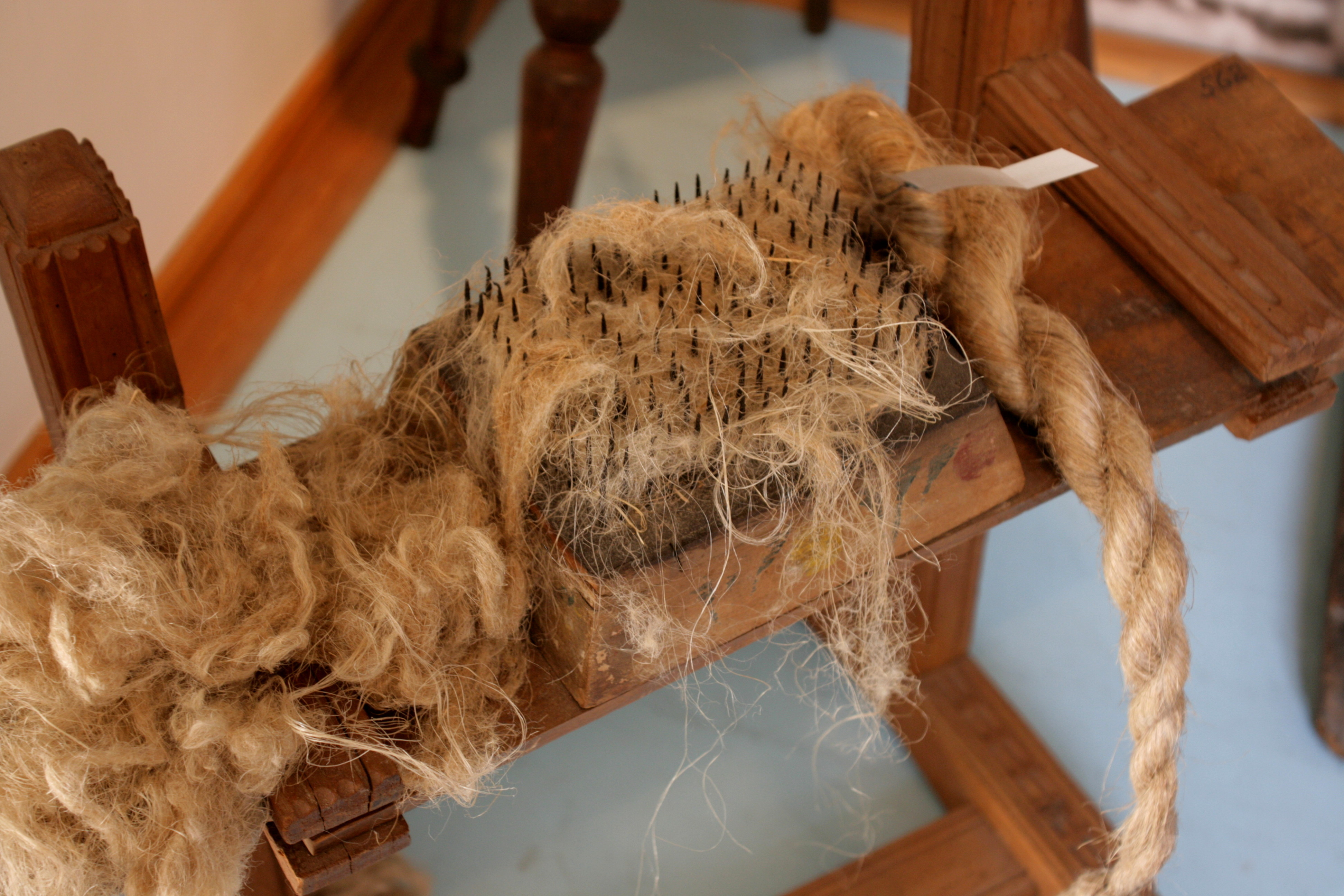 Bergisches Museum für Bergbau, Handwerk und Gewerbe, Burggraben 9-21 in Bergisch Gladbach